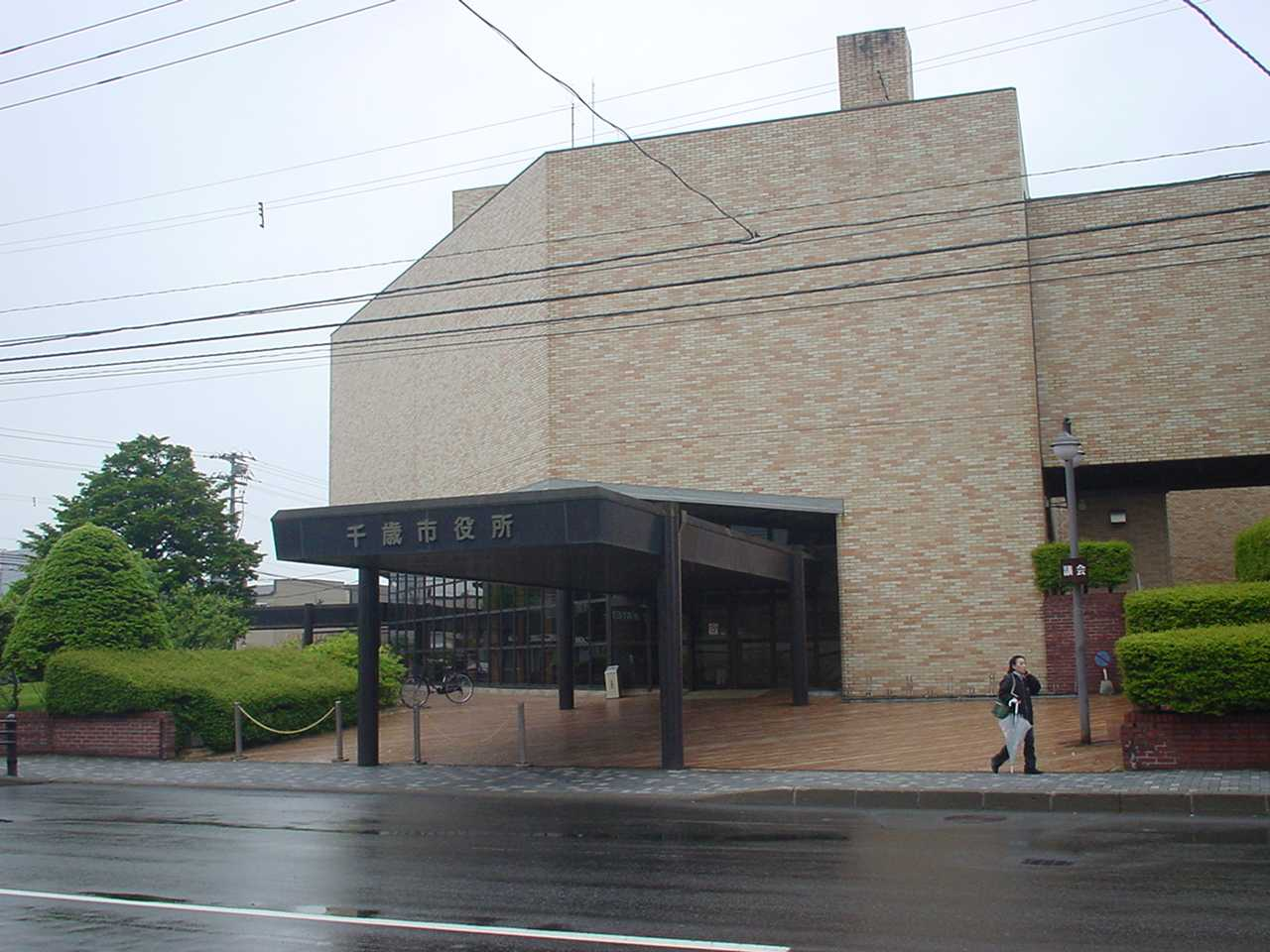 千歳市役所（2006年6月17日投稿者が撮影） Category:千歳市の画像